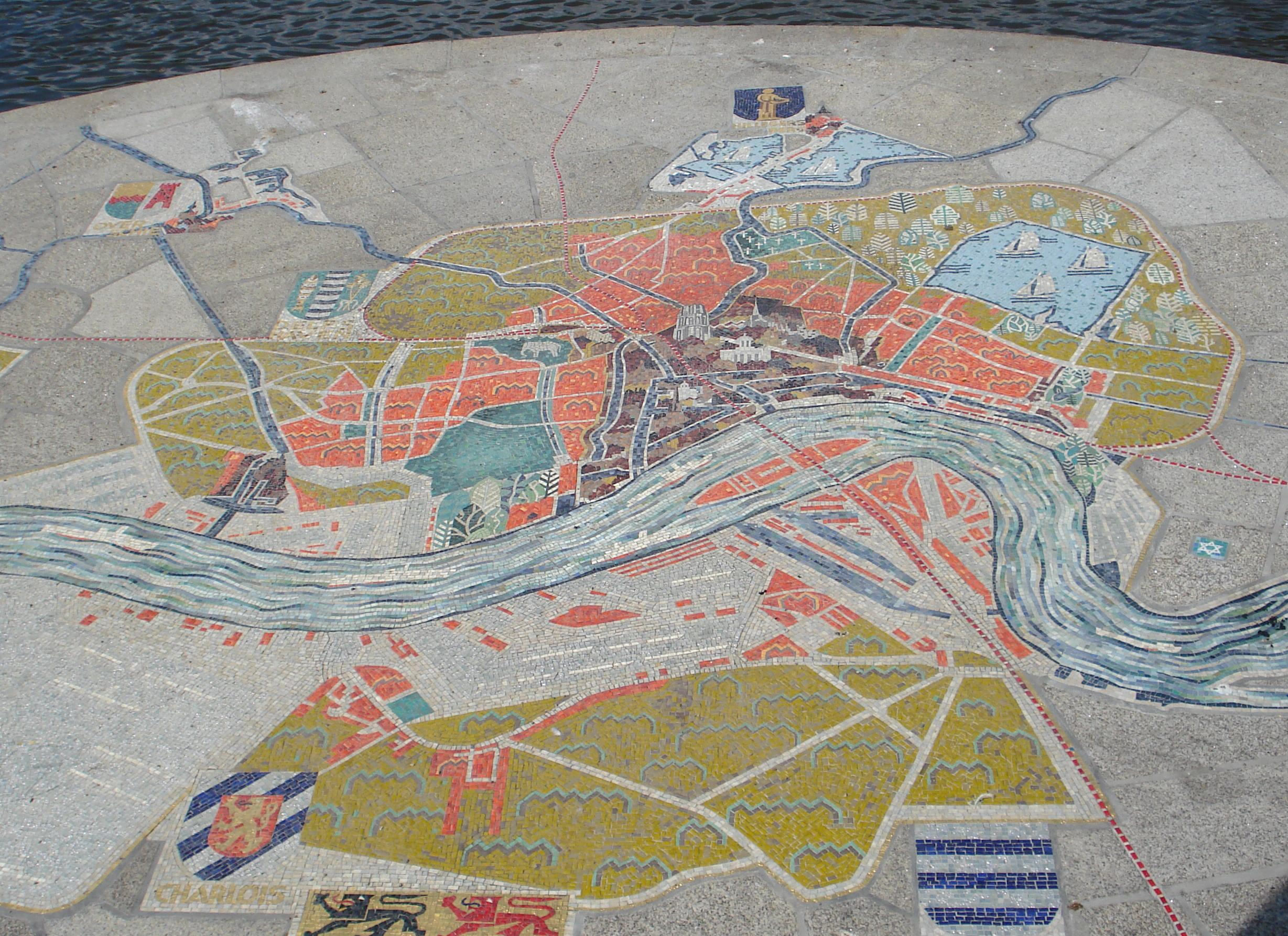 Rotterdam, Museumpark. Monument GJ de Jongh, mozaiek by Jaap Gidding in Rotterdam/The Netherlands.